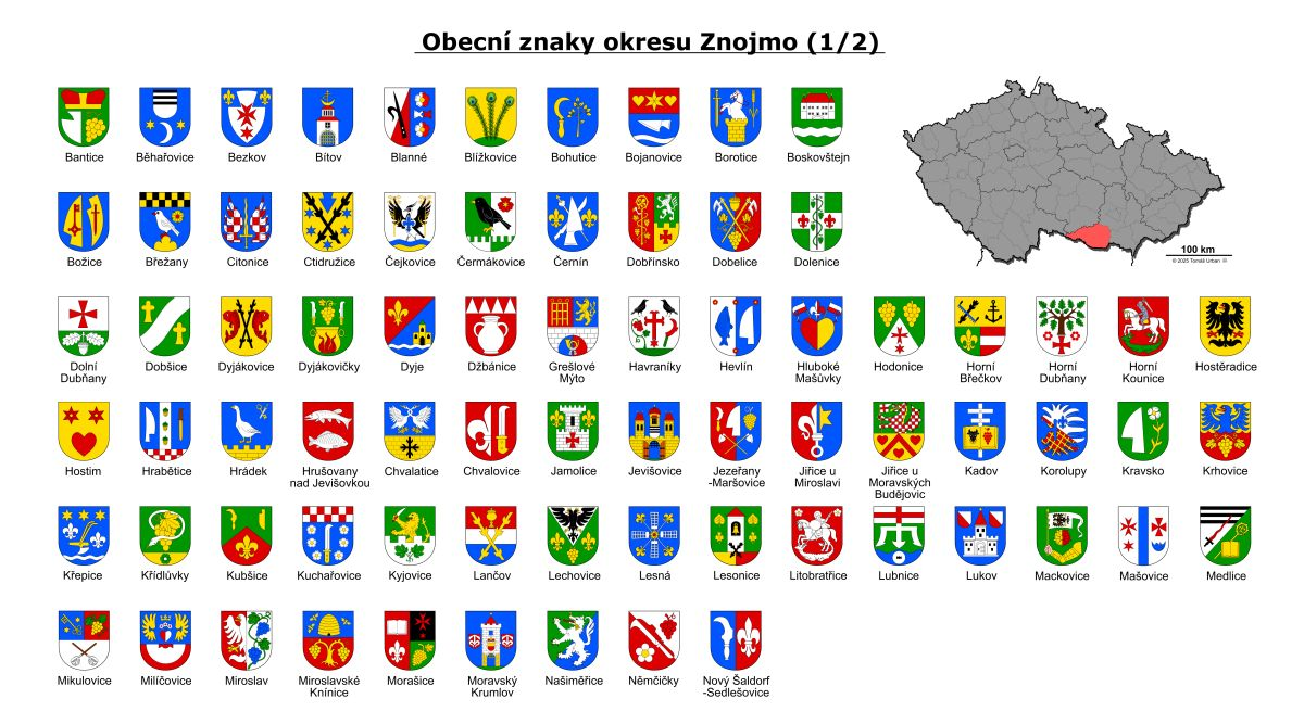 Přehled obecních znaků okresu Znojmo